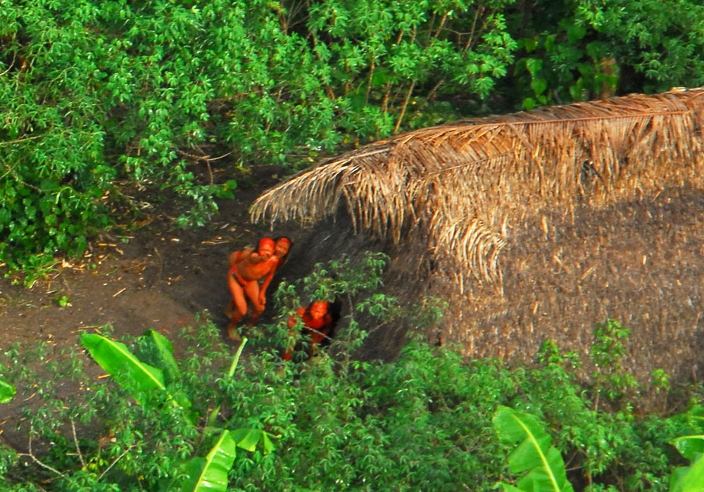 Índios isolados no estado brasileiro do Acre.